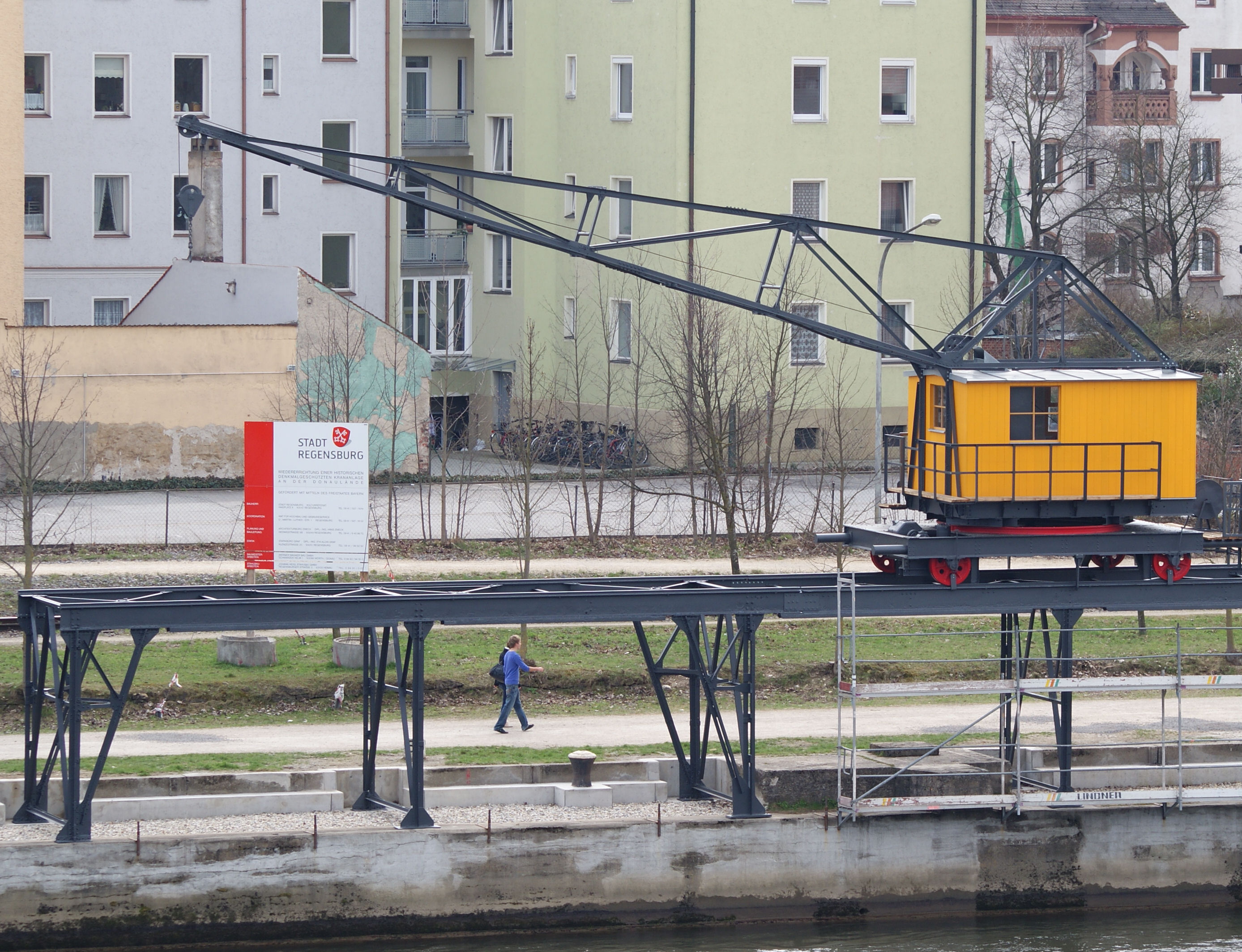 Alter Hafenkran an der Donaulände in Regensburg